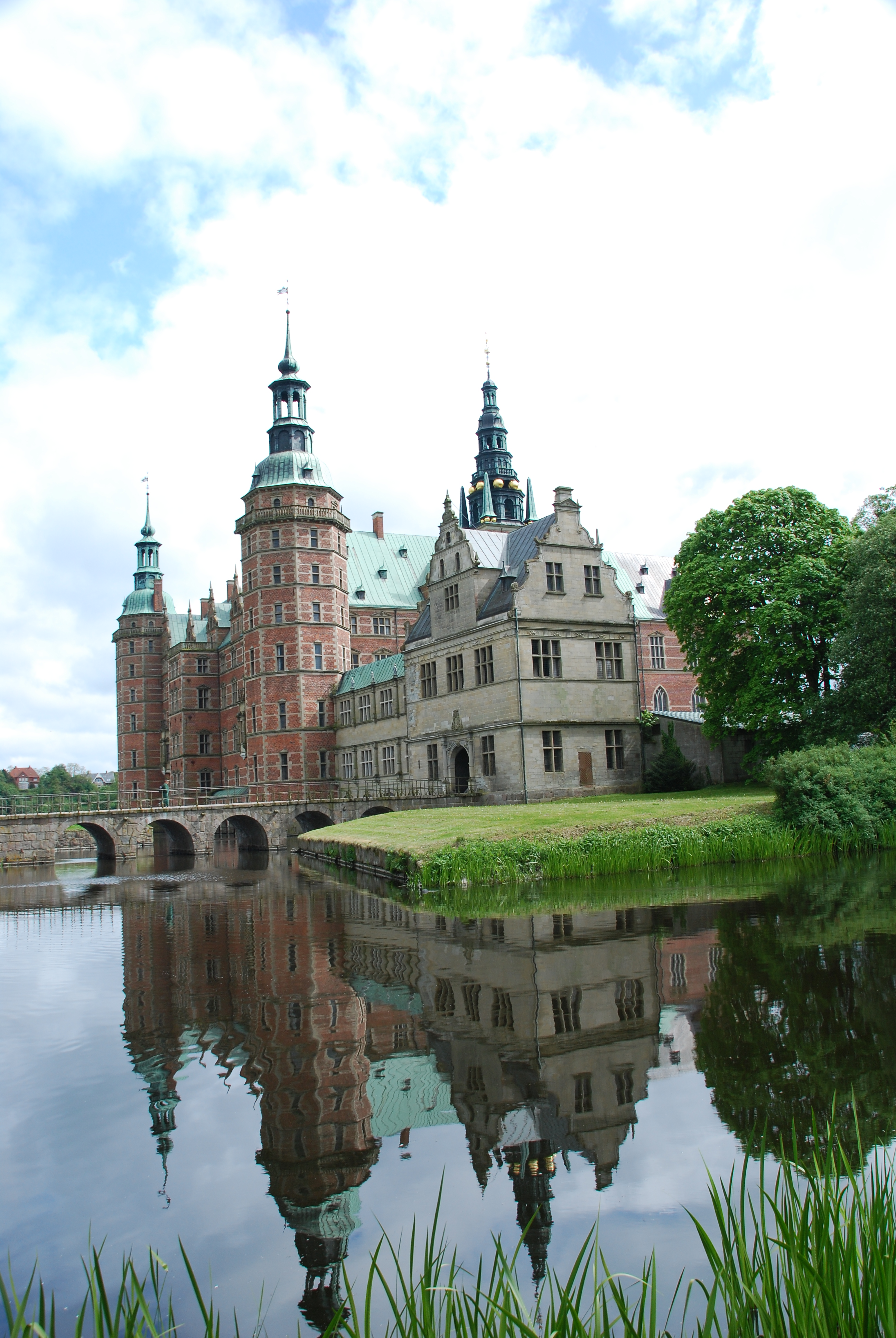 Frederiksborg Castle in Hillerød Denmark